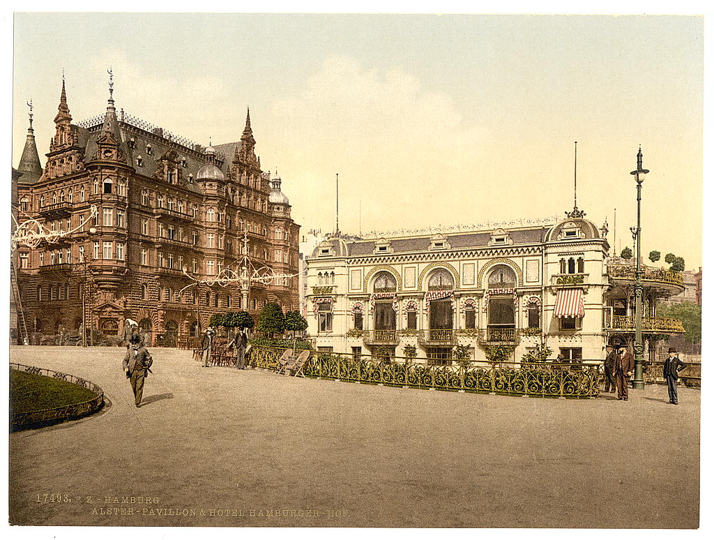 Der von Hanssen & Meerwein erbaute Hamburger Hof und der Alsterpavillon am Jungfernstieg in der Hamburger Neustadt. Die Bauplastiken am Hamburger Hof stammen von Engelbert Peiffer